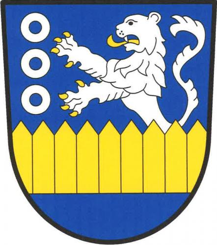 Češov znak